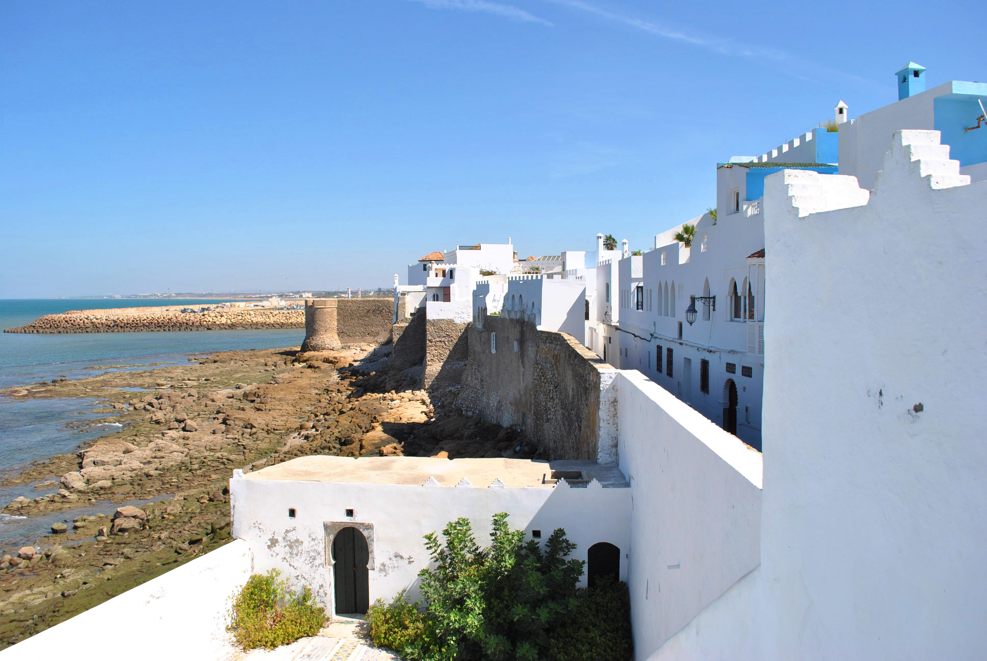 Front de mer à Assilah